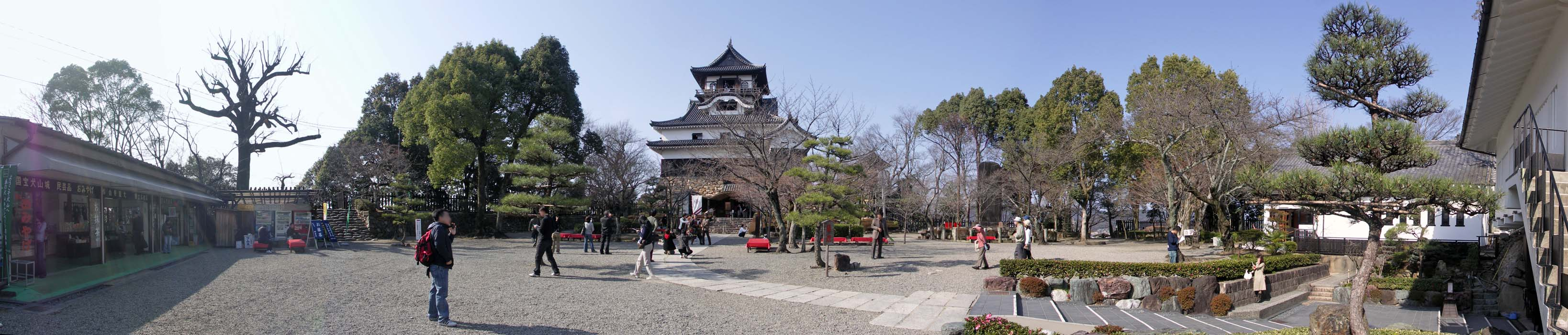 Inuyama Castle,犬山城